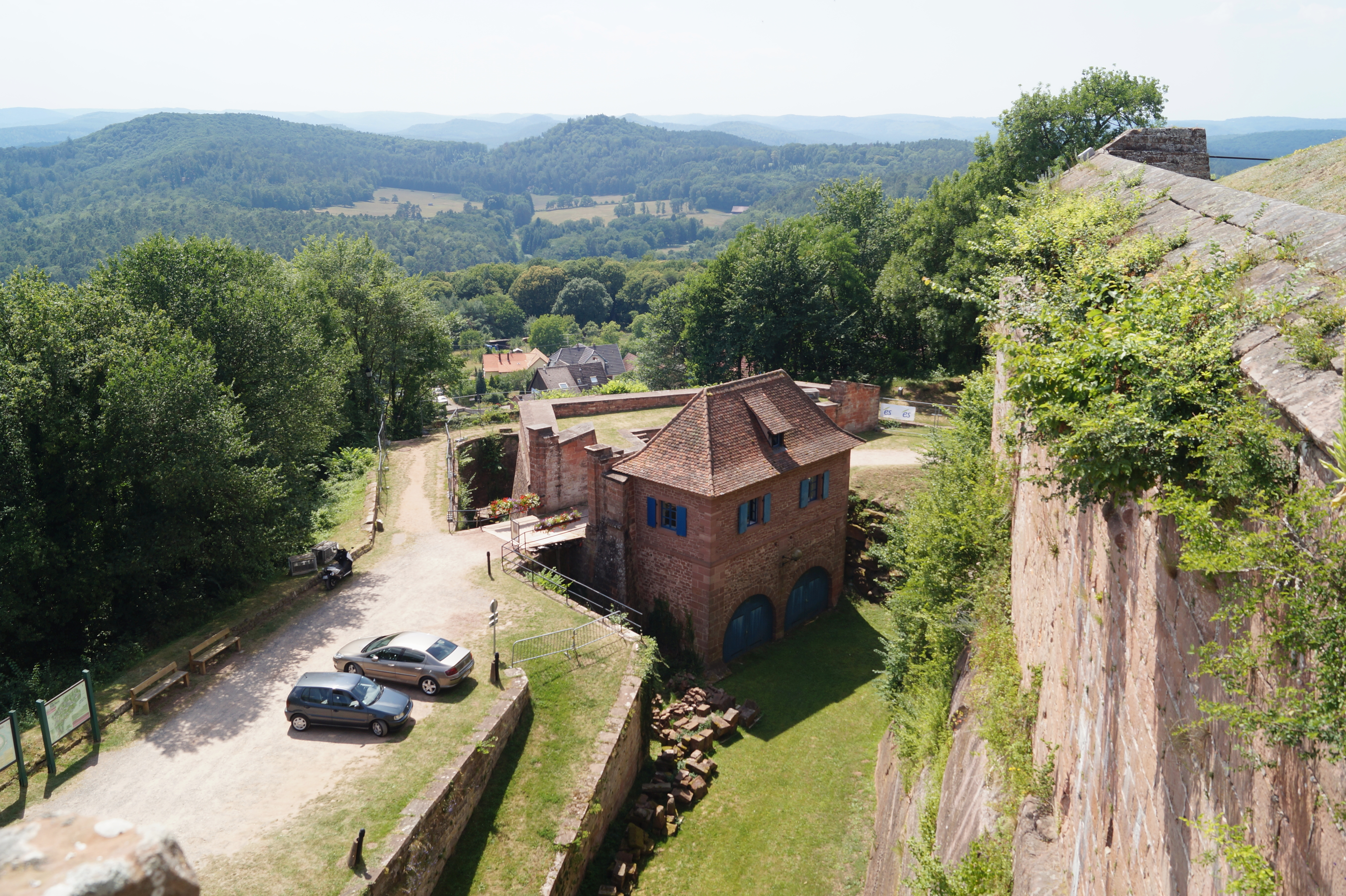 Burg Lichtenberg im Elsass, Blick auf das Wchhaus, heutige Museumskasse.